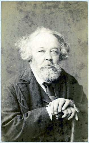 Бакунин, Михаил Александрович (1814-1876; Цюрих, 1872, J.Ganz). На обороте текст: “Смирнову в залог будущих коллективных революционных действий. М. Бакунин. Цюрих, 9.VIII.1872”. (BG A1/564)